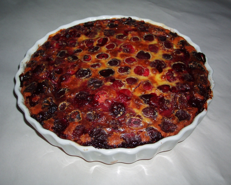 Image d'un clafoutis dans un plat à tarte en porcelaine blanche. Gâteau réalisé et photographié par moi-même. Utilisateur:Joan-T juin 2005